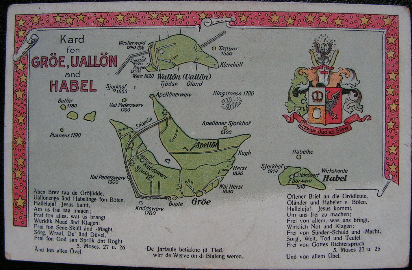 Karte (Nordfriesisch) auf Postkarte: Halligen Gröde/Appelland, Oland, Habel. Titel der Postkarte: Kard fon Gröe, Uallön and Habel. Halligennamen auf Karte: Wallön (Uallön) = Oland, Gröe = Gröde, Appellön = Appelland Sjorkhof = Kirchhof (Wikipedia:Auskunft/Archiv/2017/Woche_21#Was_ist_ein_Sjorkhof?)